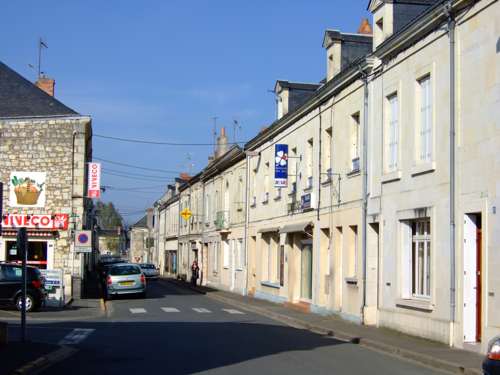 La rue de la République à Gennes (Maine-et-Loire)